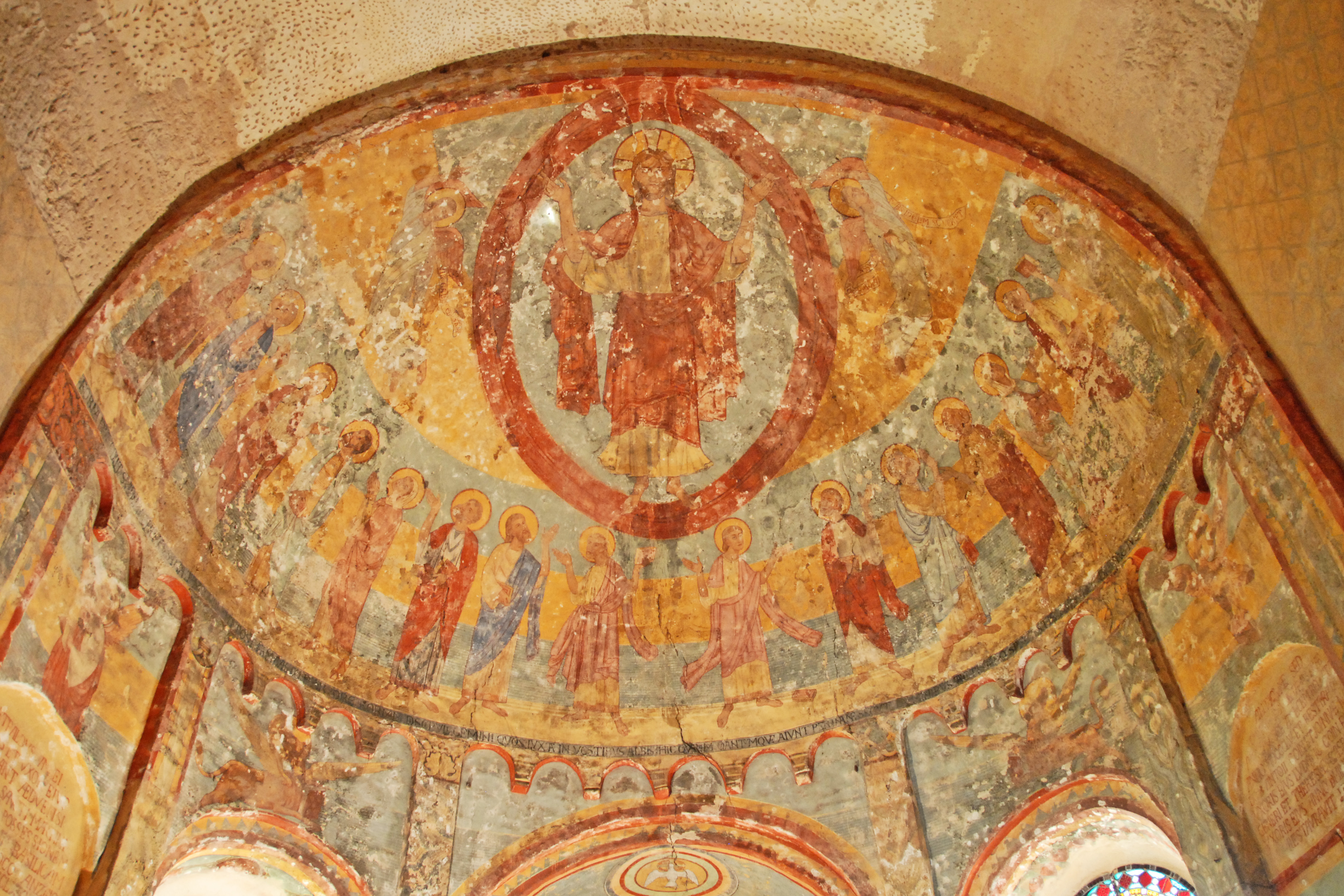 Fresko Chorapsiskalotte